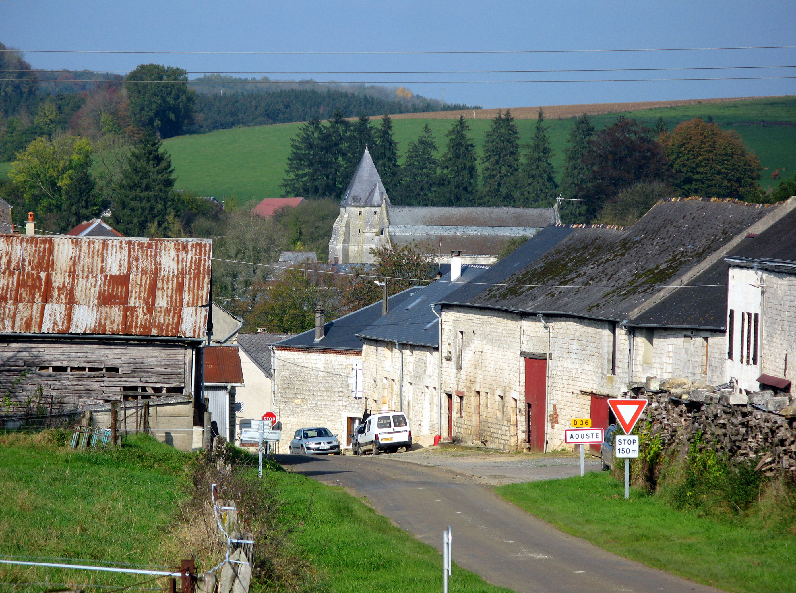 Aouste (Ardennes, France) - La route départementale D 36 entrant par le Sud dans la localité.